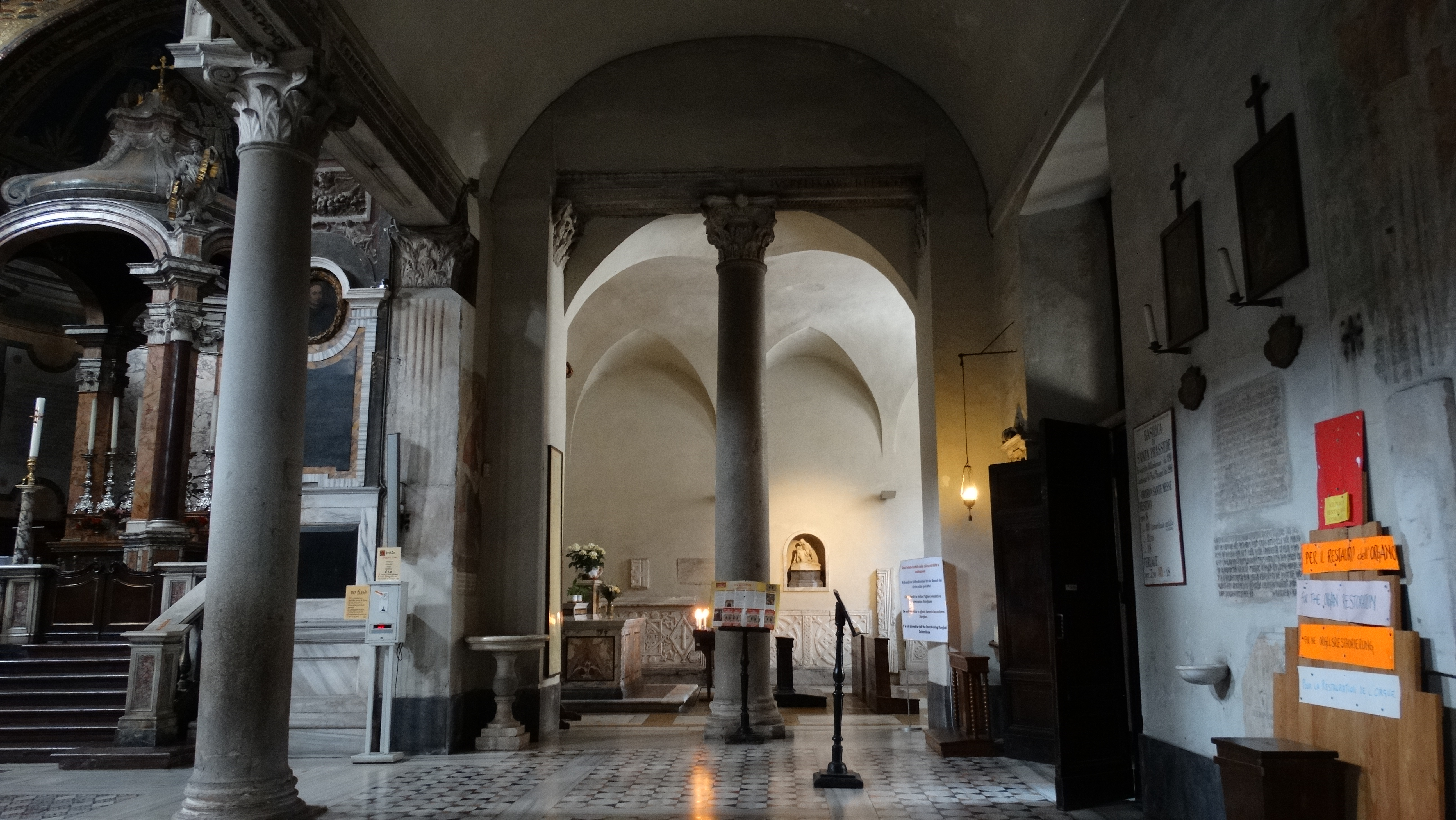 Cappella del Crocifisso vista dalla navata destra